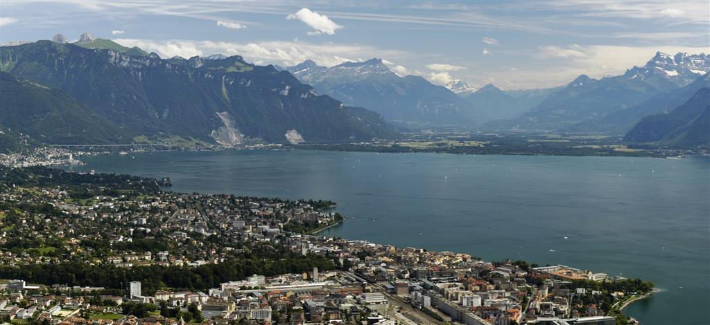 Vevey ir Montreux miesteliai prie Ženevos ežero.